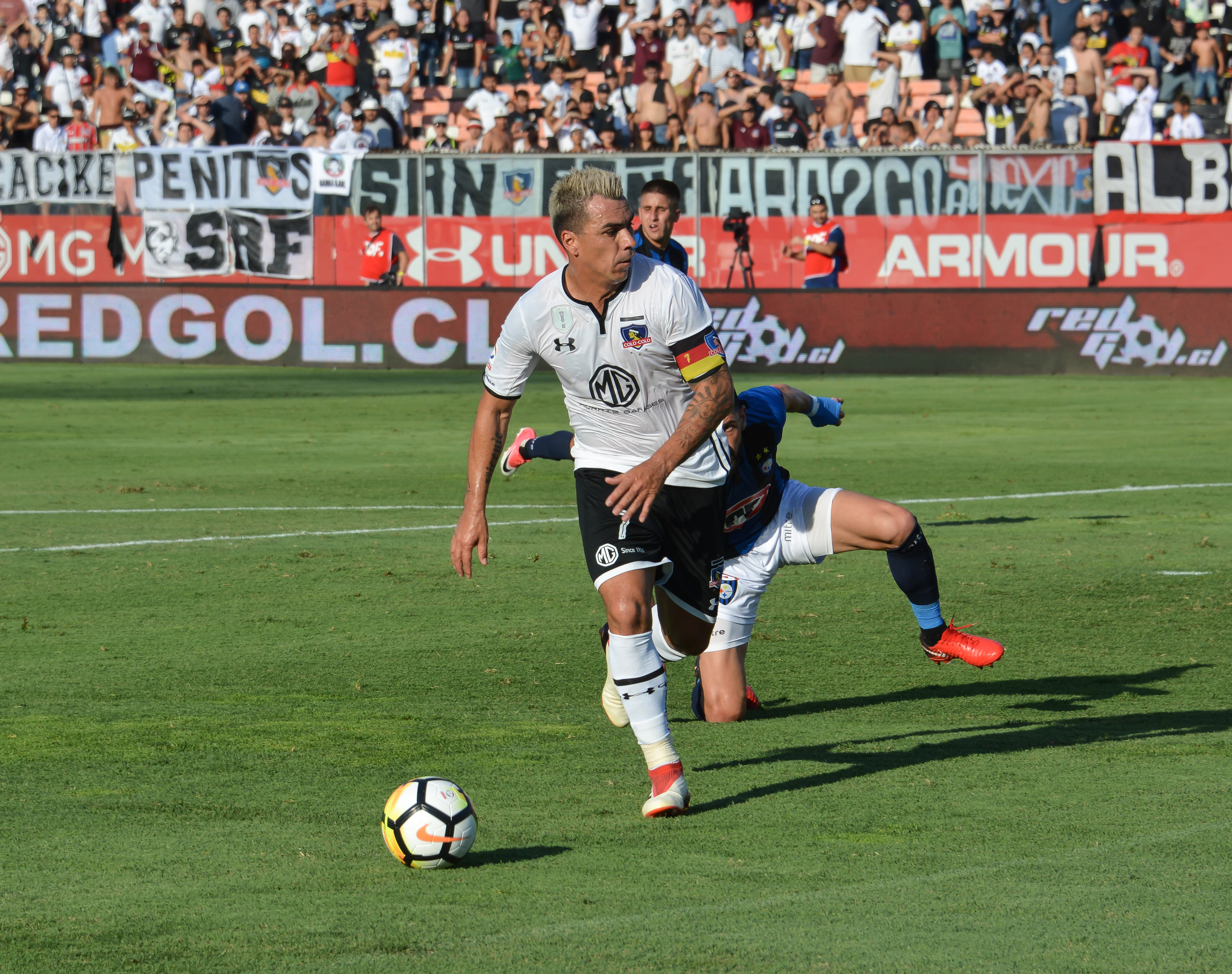 Colo Colo v Huachipato, Estadio Monumental, Santiago, Chile.